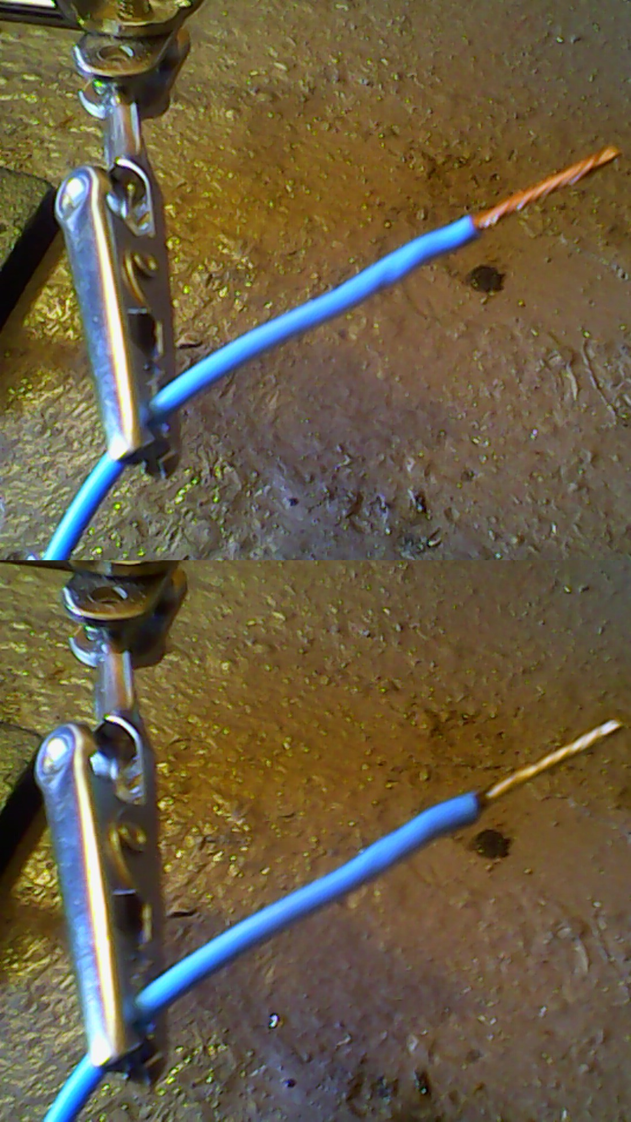 Медный электропрвод до (вверху) и после лужения (внизу)